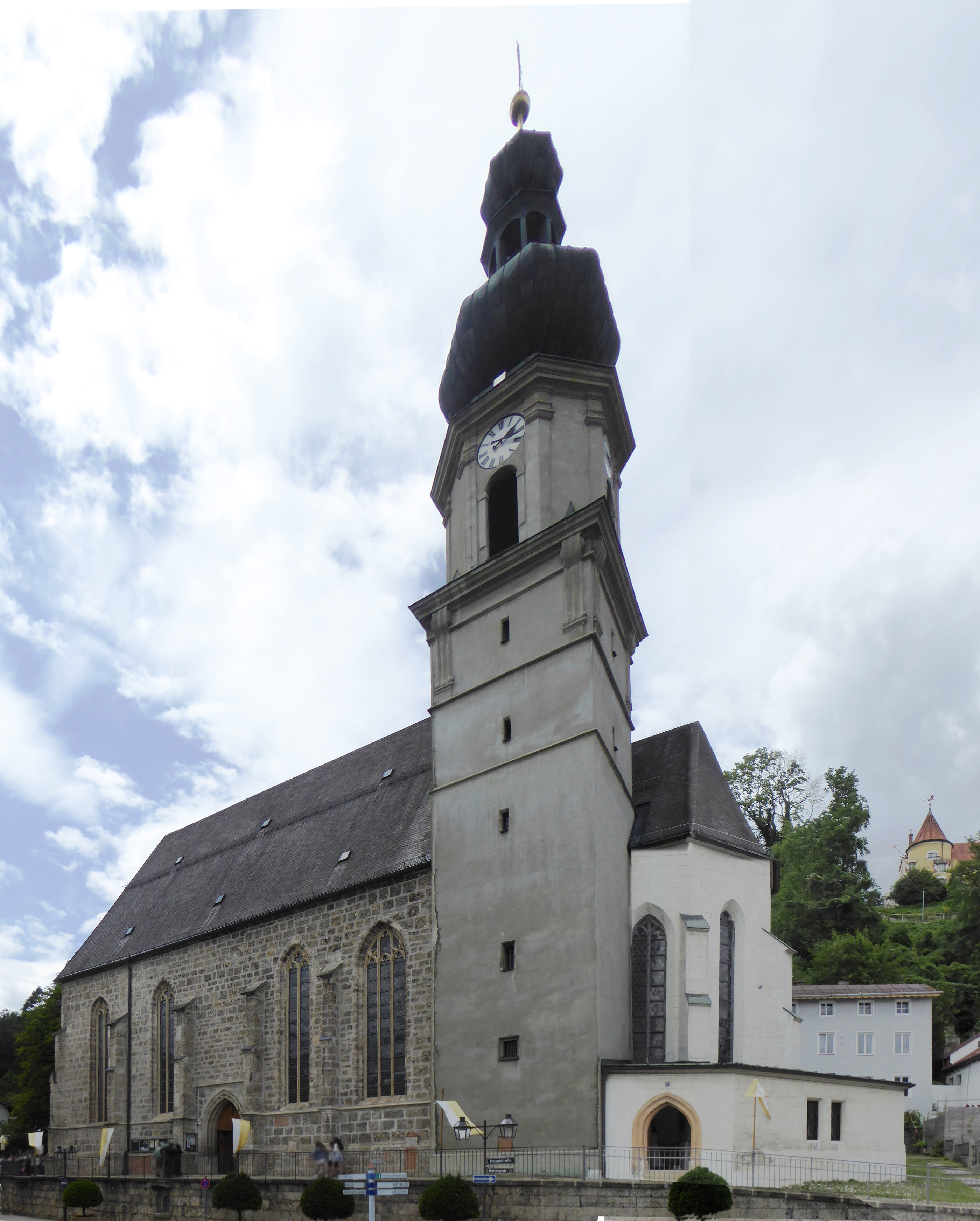 Trostberg, Andreaskirche von Südosten gesehen.